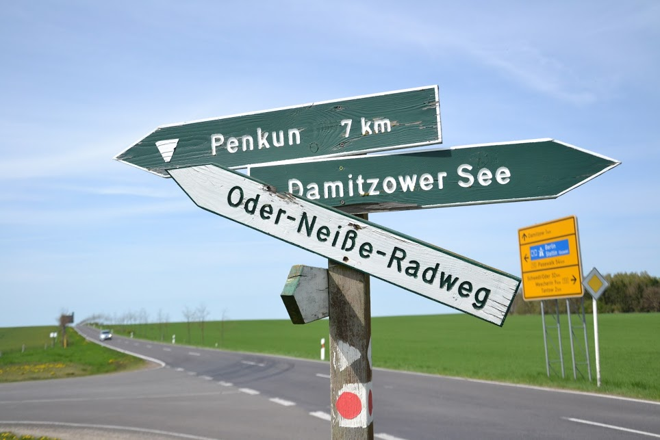 Skrzyżowanie